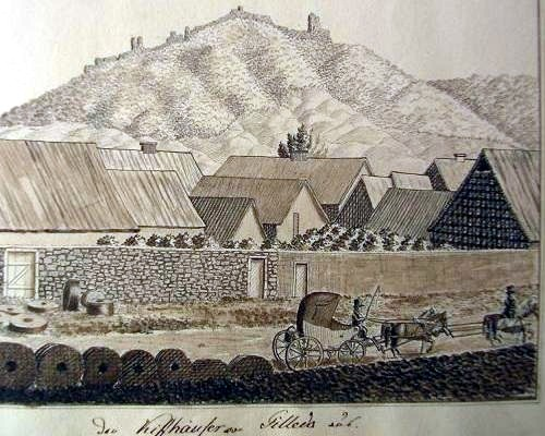 Der Kiffhäuser von Tilleda aus gesehen, Tuschezeichnung Anfang des 19. Jahrhunderts aus dem Nachlass meiner Schwiegermutter Erika Meyer, geb. Heußinger.